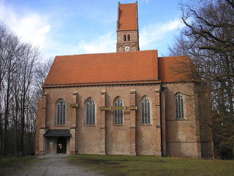 Burg Oberwittelsbach (Wittelsbach) bei Aichach (Landkreis Aichach-Friedberg, Bayerisch-Schwaben). Die spätgotische Sühnekirche auf dem Burgplatz. Eigene Aufnahme, Feb. 2007 / Oberwittelsbach (Wittelsbach) castle near Aichach (Bavaria, Germany). The late gothic church on the plateau. Own photo, Feb. 2007